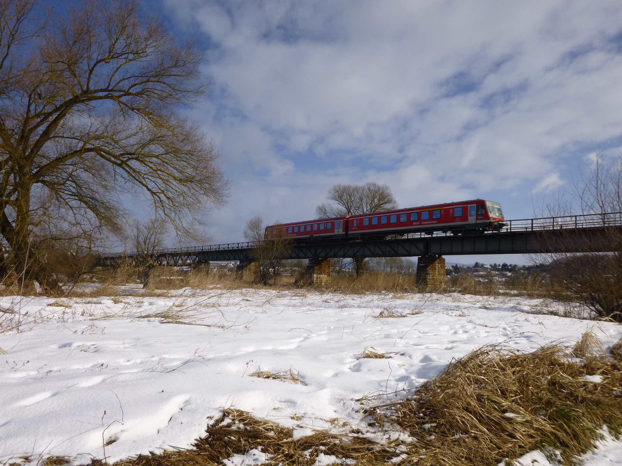 Die Gäubodenbahn fährt auf der Eisenbahnbrücke bei Bogen über die Donau und ist kurz vor dem Eintreffen am Bahnhof Bogen = Endbahnhof.